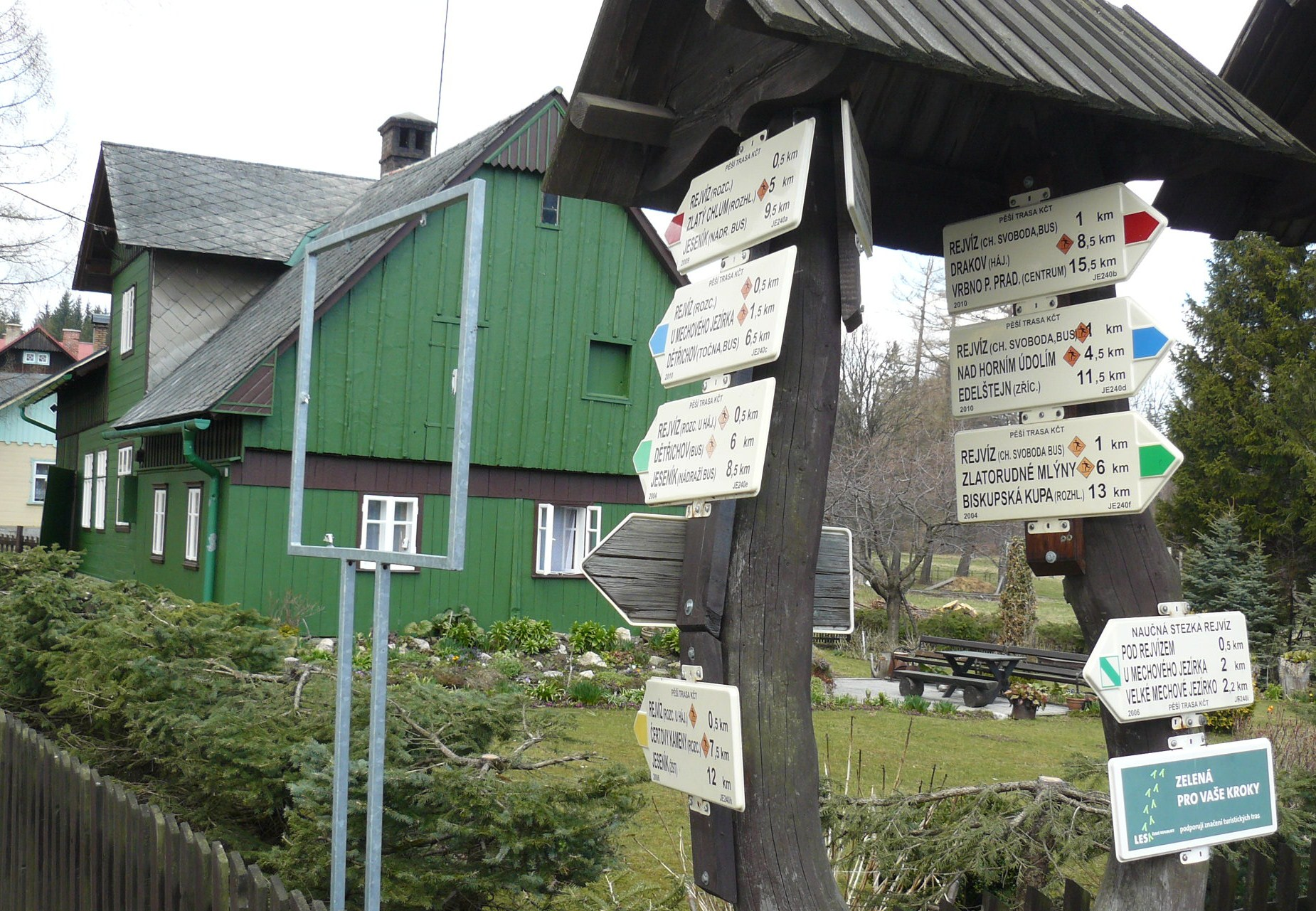 Rejvíz.